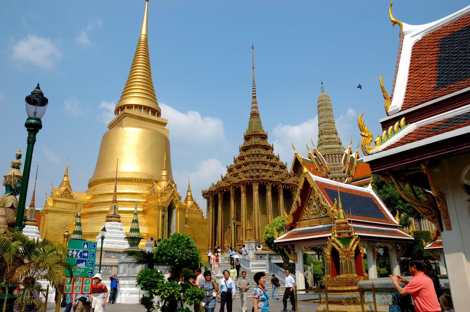 Silom, Bang Rak, Bangkok, Thailand